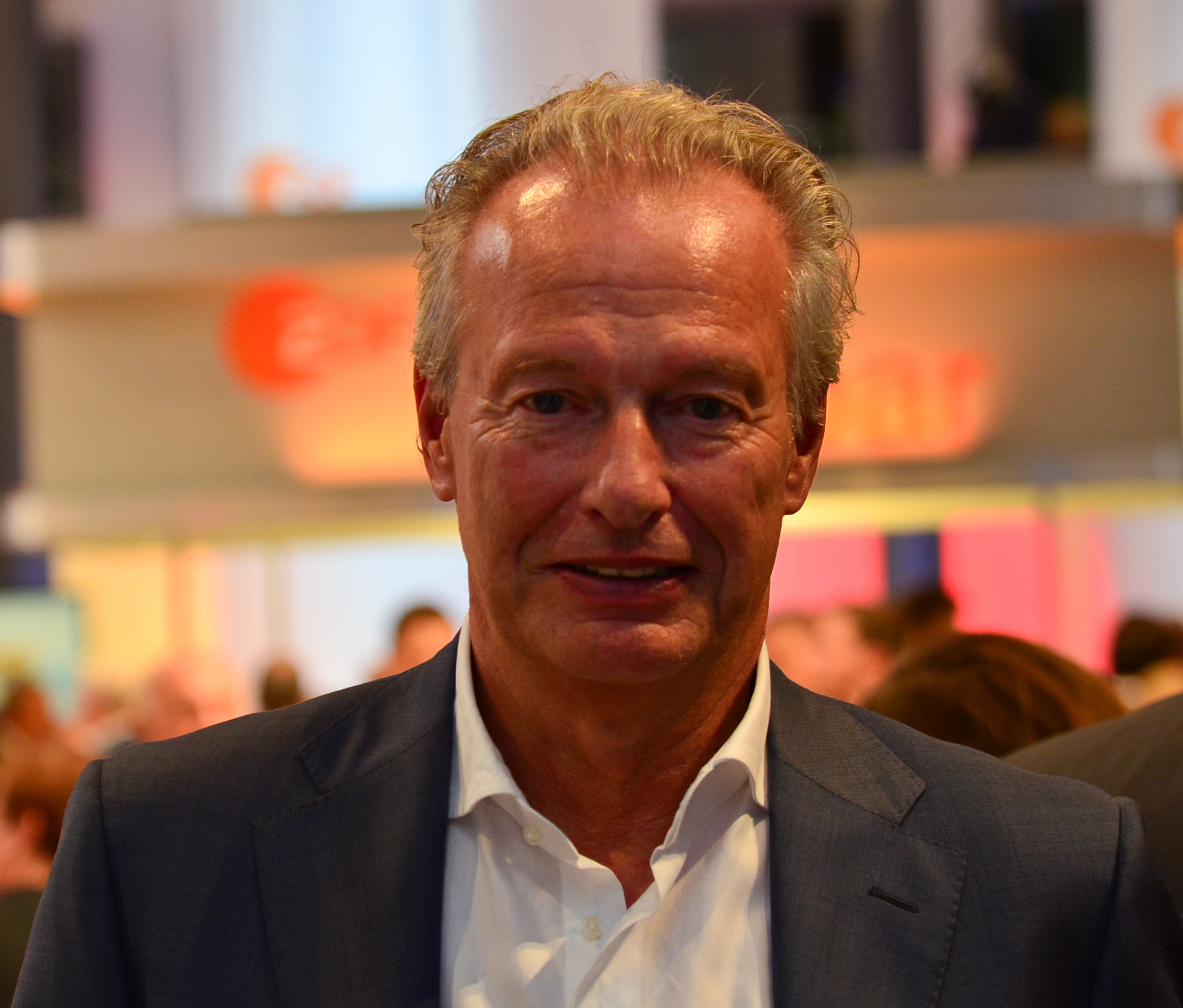 Klaus-Peter Siegloch - WP:Fotoprojekt zur Bundestagswahl 2013 in Berlin in den Parteizentralen und dem ZDF